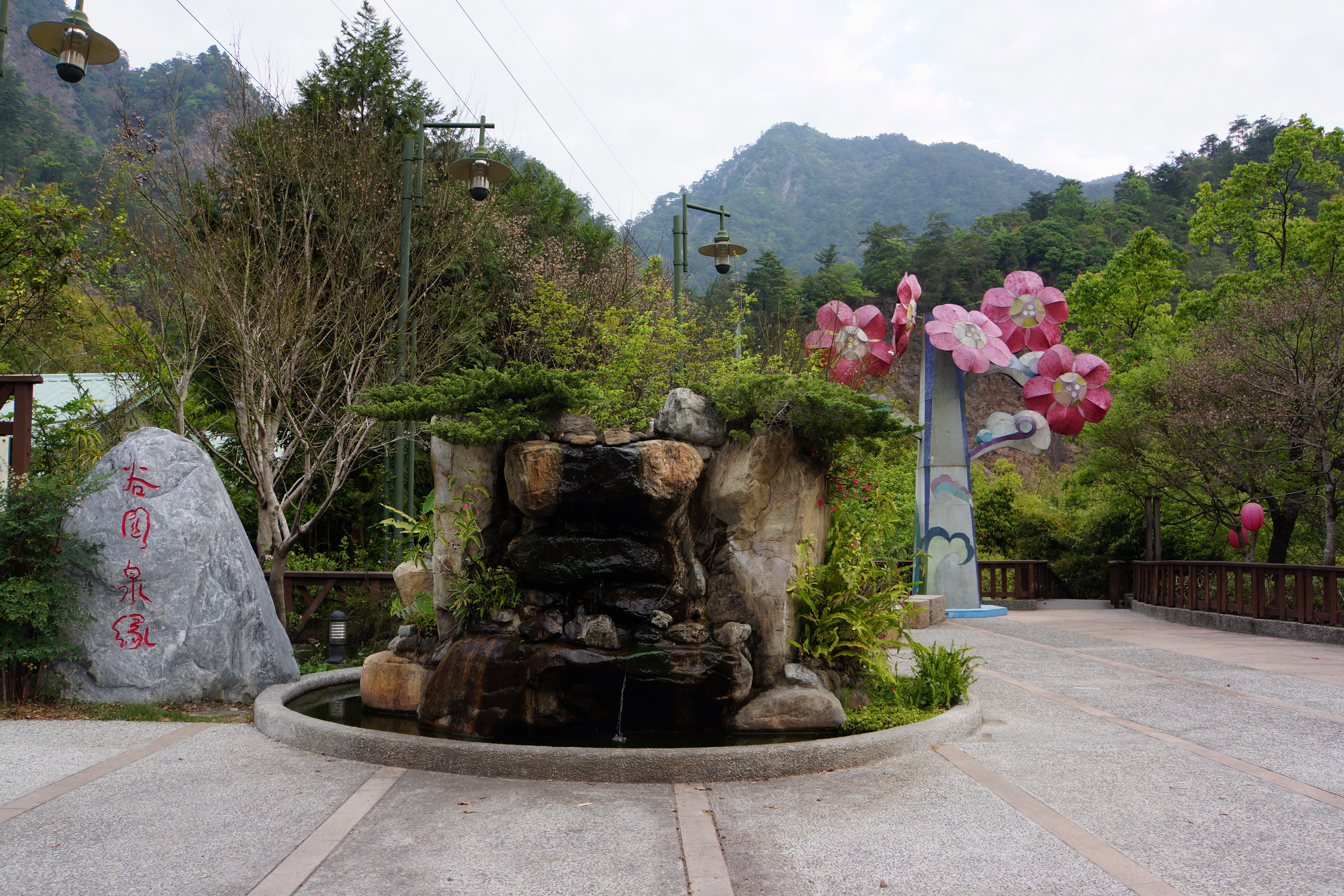 谷關温泉公園 Guguan Hot Springs Park